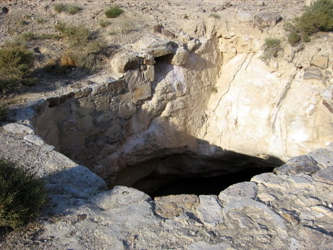 ye'elim